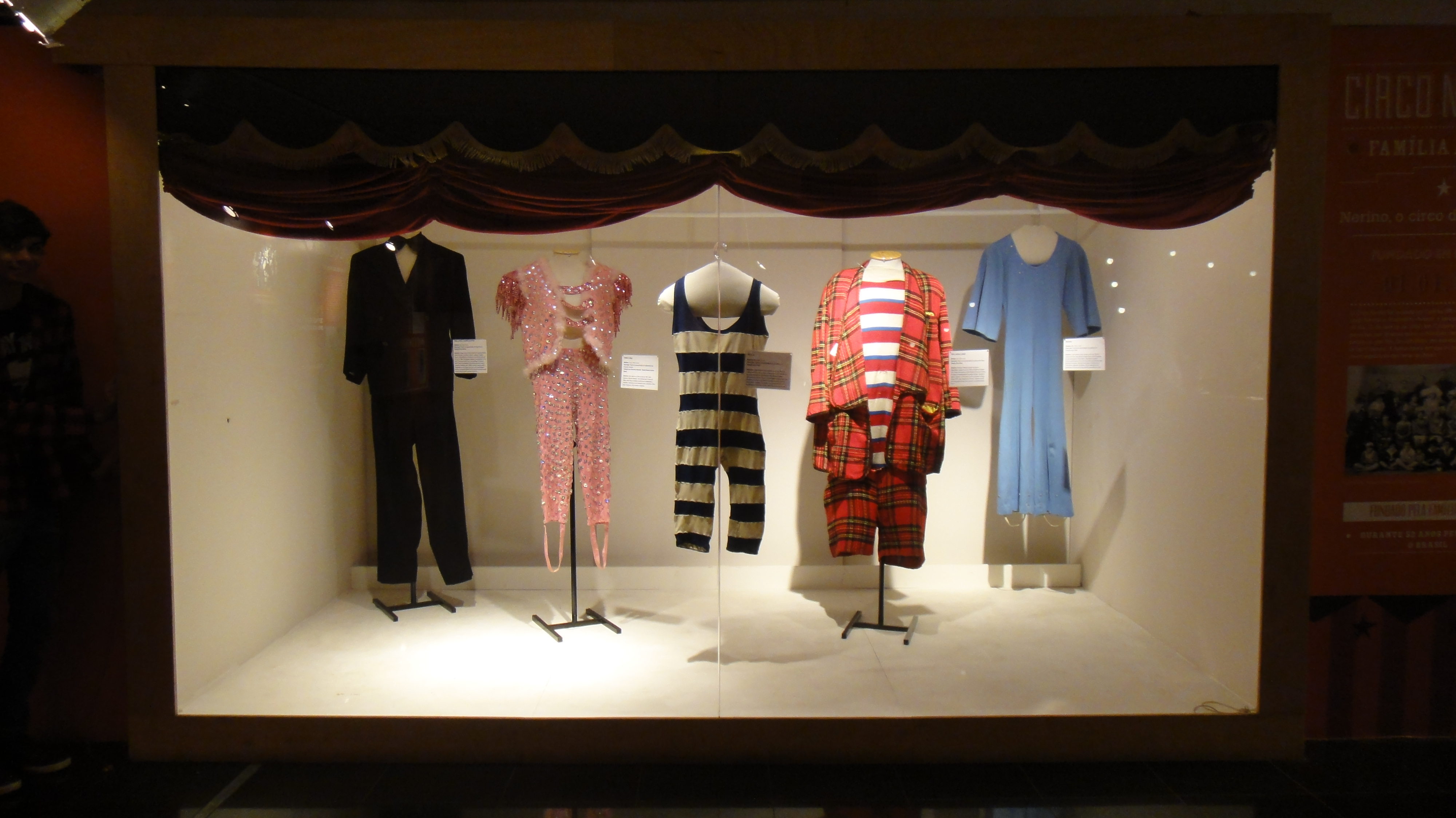 Alguns figurinos usados sala de cima do Centro de Memória do Circo